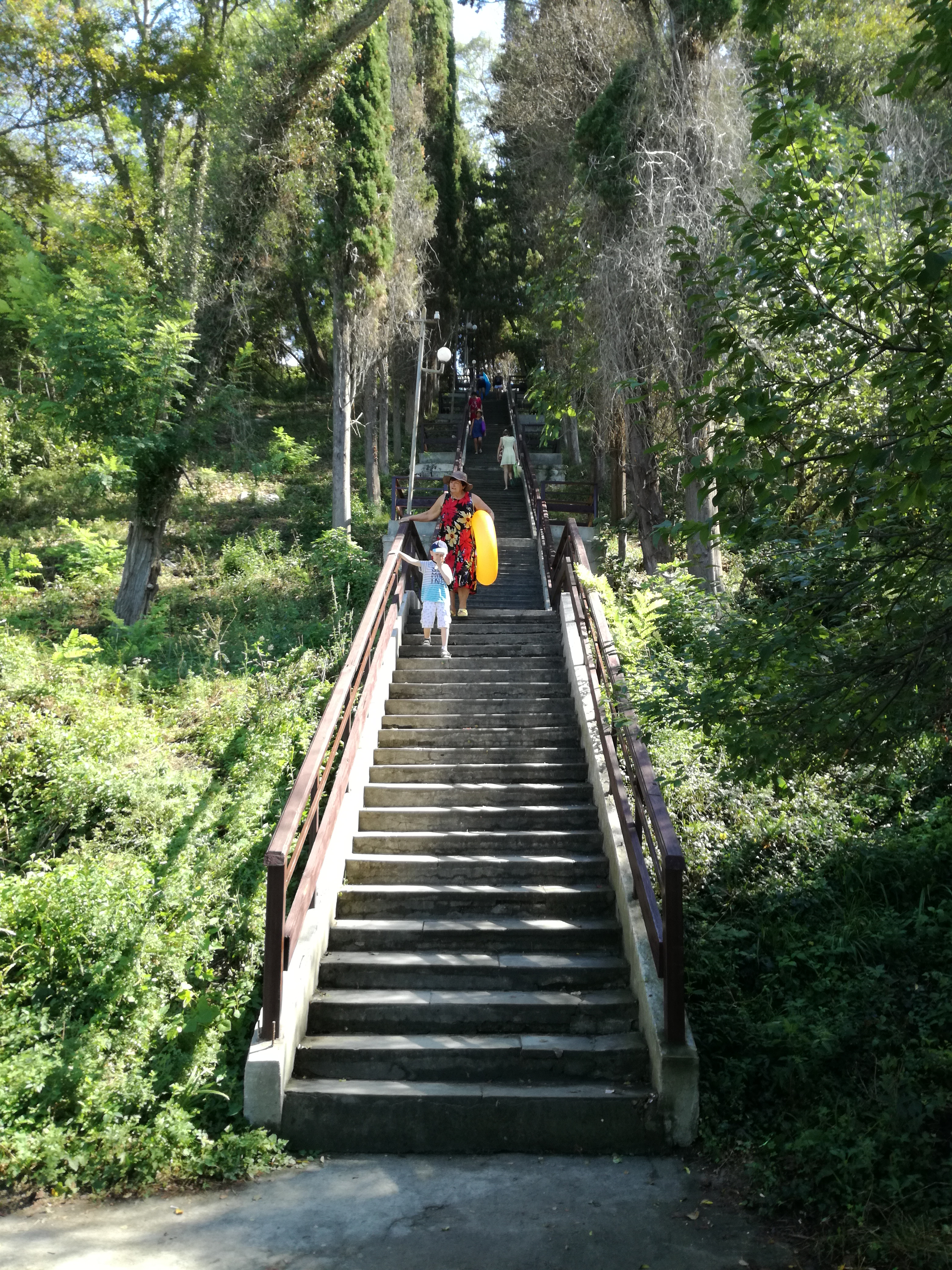 Вишневка